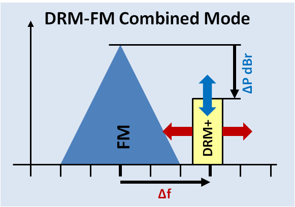 Digital Radio Mondiale - DRM-FM Combined Mode